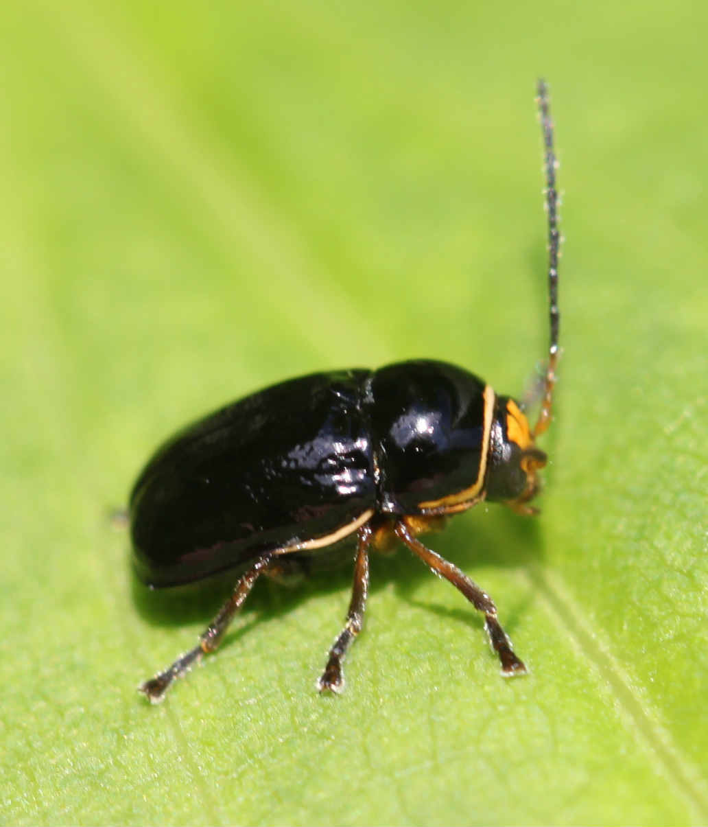 Cryptocephalus cf. flavipes am 4.6.2017 am Rheinufer südlich von Mannheim